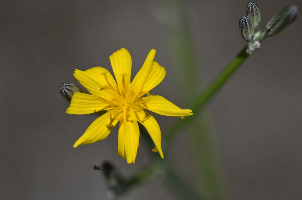 Chondrilla juncea